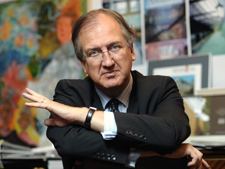 Andrzej Marek Chołdzyński